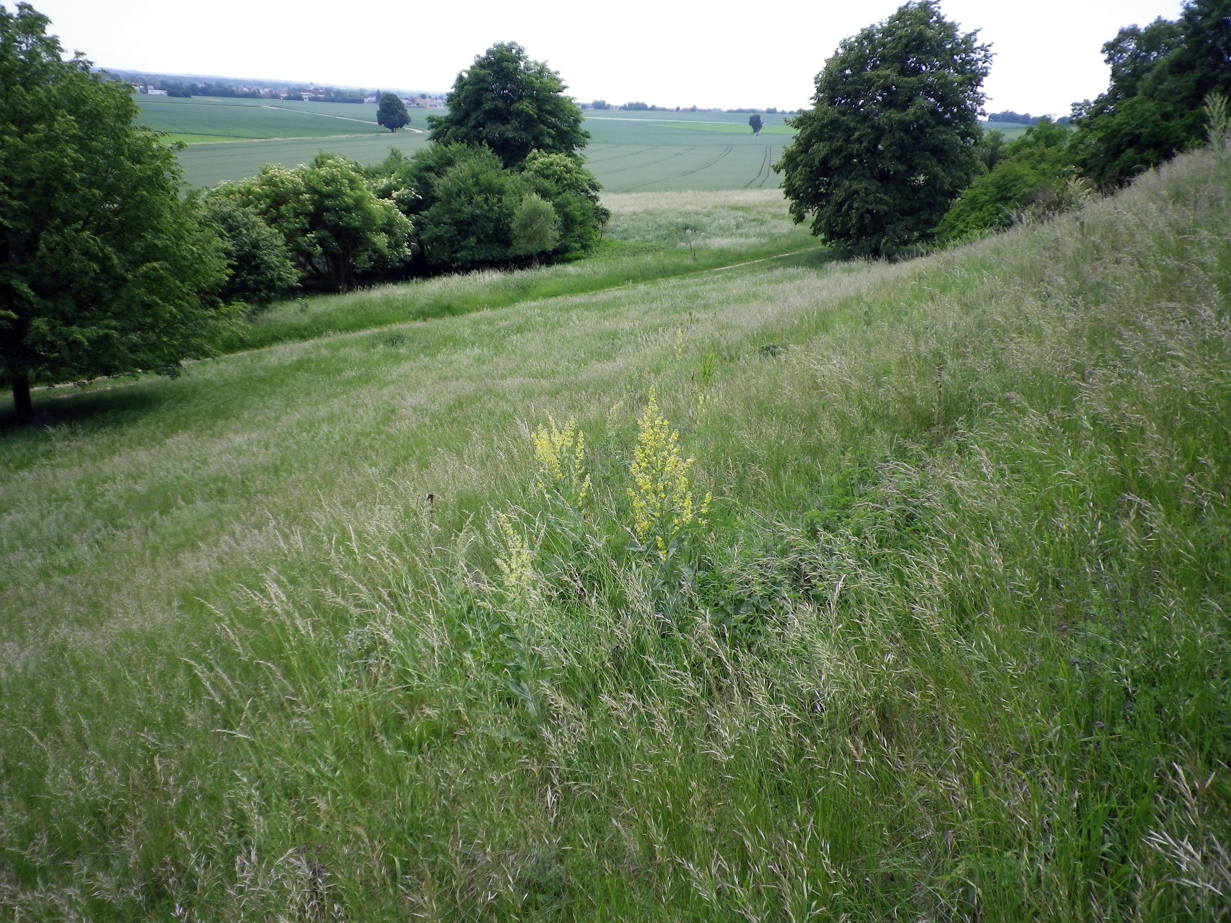 Wellheimer Trockental bei Mauern